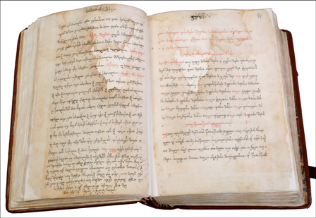 ვახტანგ VI-ის სამართლის წიგნთა კრებული (S-3683)